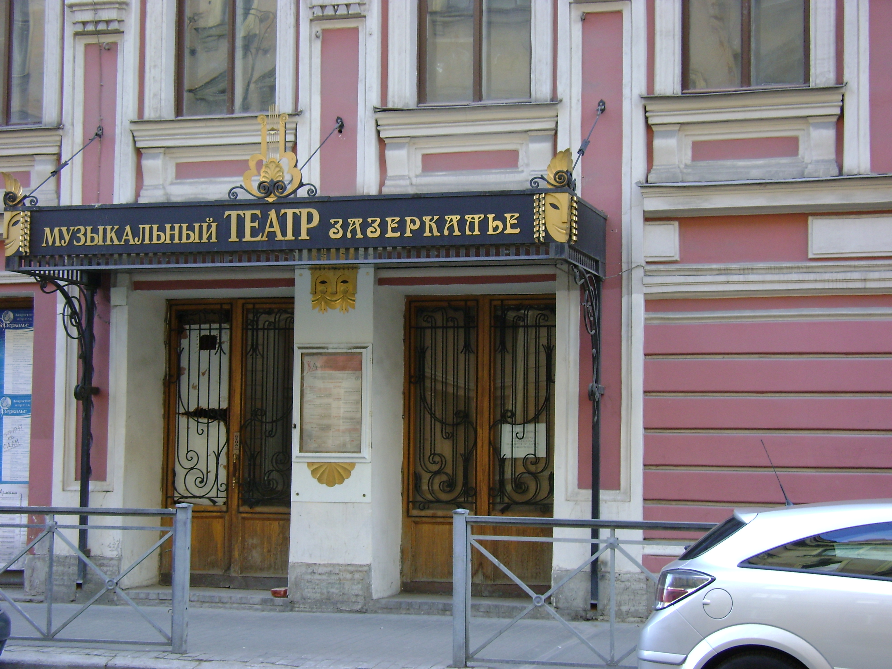 Театр "Зазеркалье" на ул. Рубинштейна 13 (Санкт-Петербург).